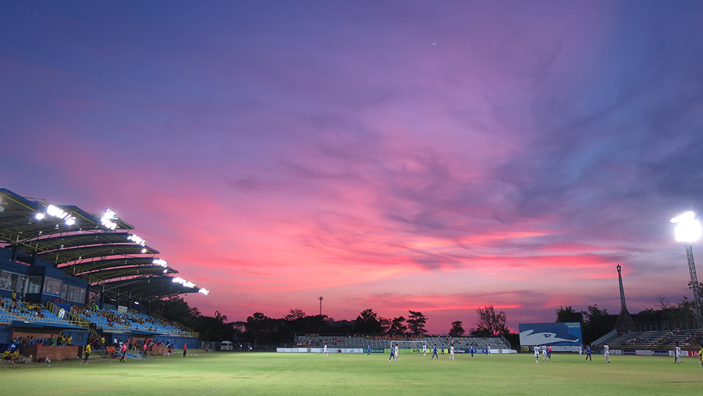 Pattaya, Patatya United Stadium 2016